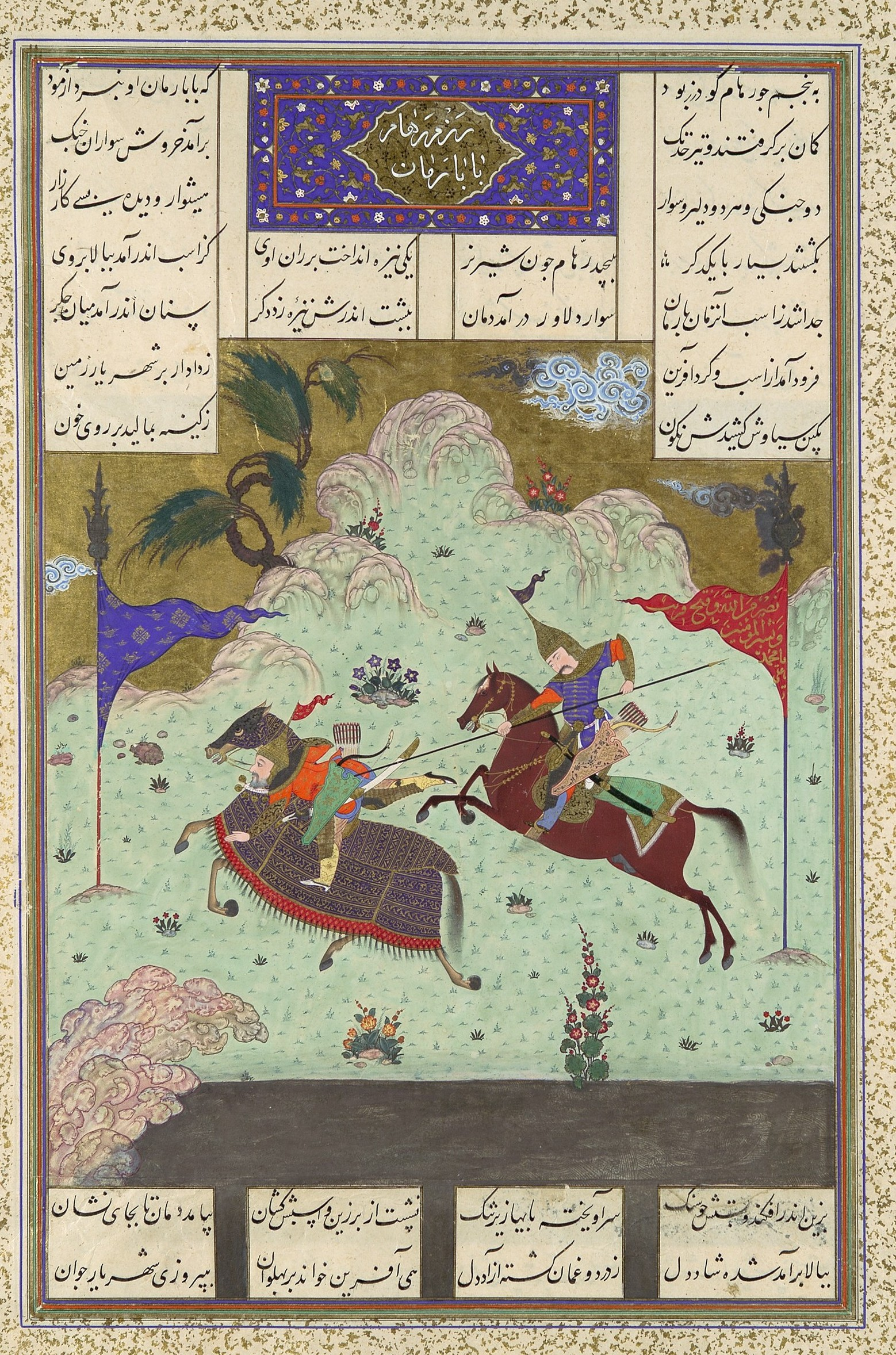 Davazdah (12) Rokh Battle.Iran&Turan Davazdah (12) Rookh the famous war between Iran& Turan